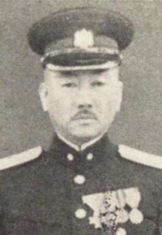 細川興治子爵（1890～1977）